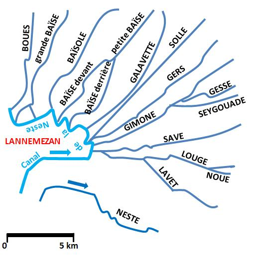 Localisation des rivières autour de Lannemezan, Hautes-Pyrénées. Travail personnel réalisé sur Paint